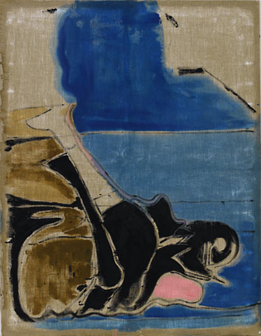 Self with blue shadow 2, oil on canvas, 70.9 x 55.1 inches